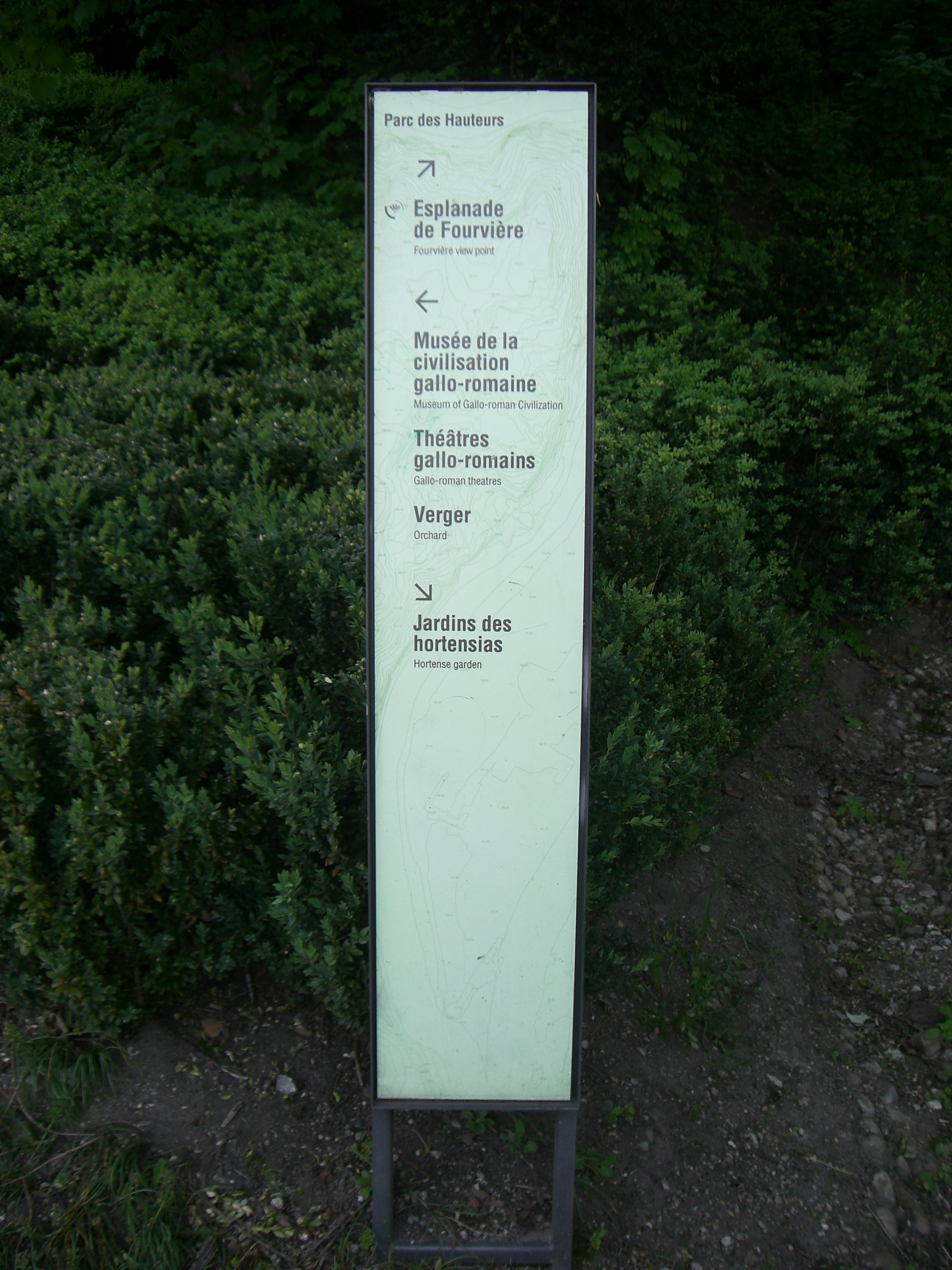 Parc des Hauteurs Lyon